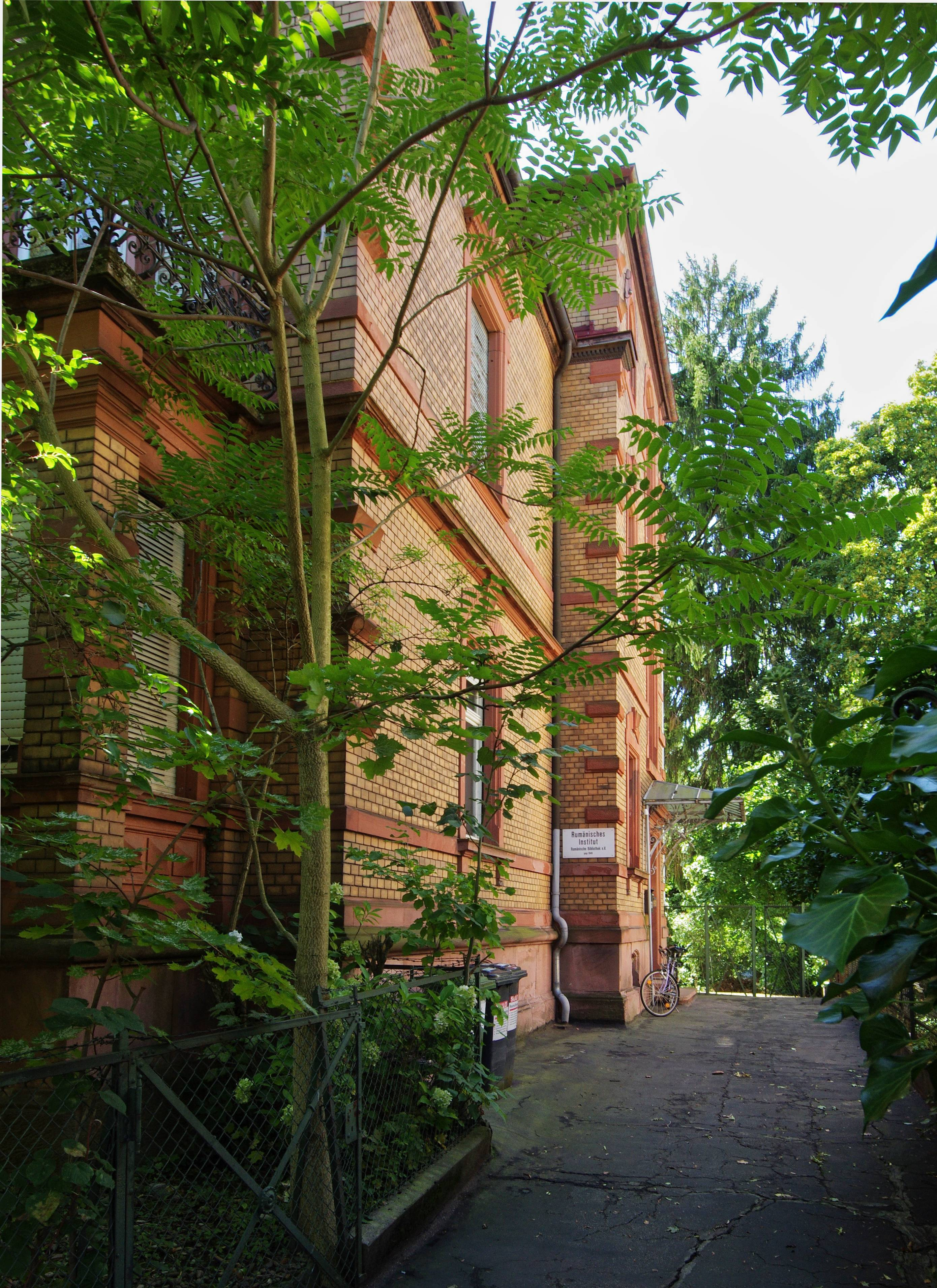 Rumänisches Institut - Rumänische Bibliothek e.V., Uhlandstr. 7, 79102 Freiburg